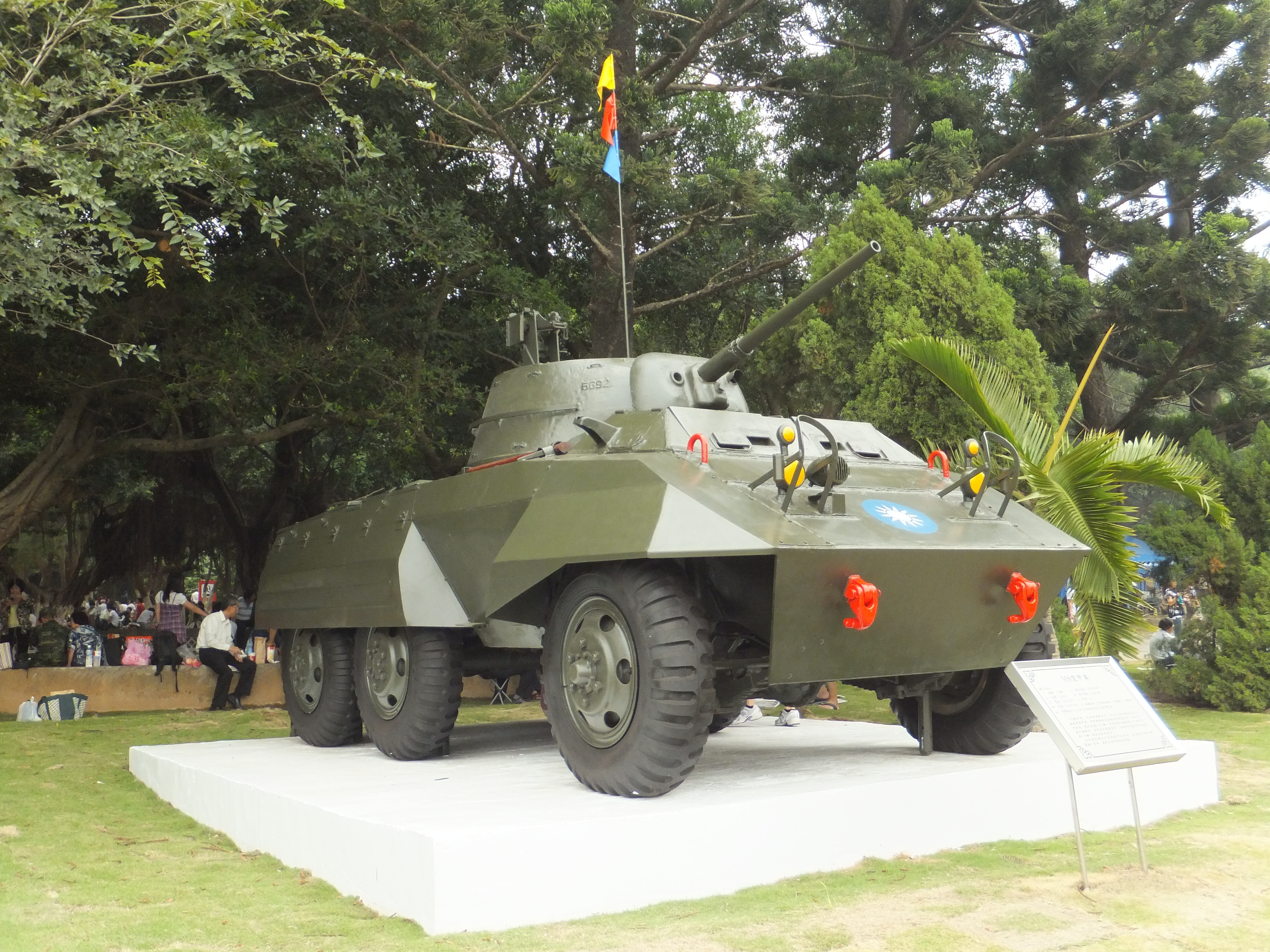 成功嶺介壽臺側展示的中華民國陸軍M8裝甲車。